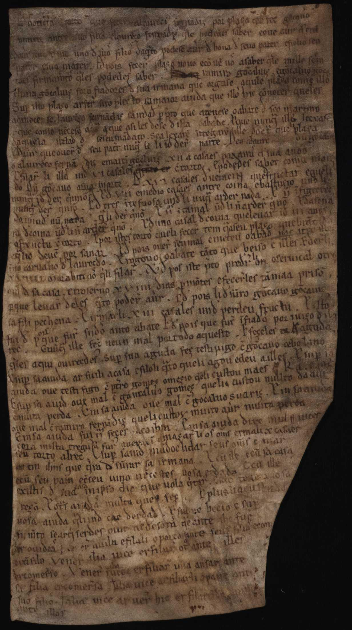 Noticia de Torto. Orde de San Benito, Mosteiro do Salvador de Vairão, mç. 2, doc. 40. 1 doc. (313 x 170 mm); perg. Anverso.